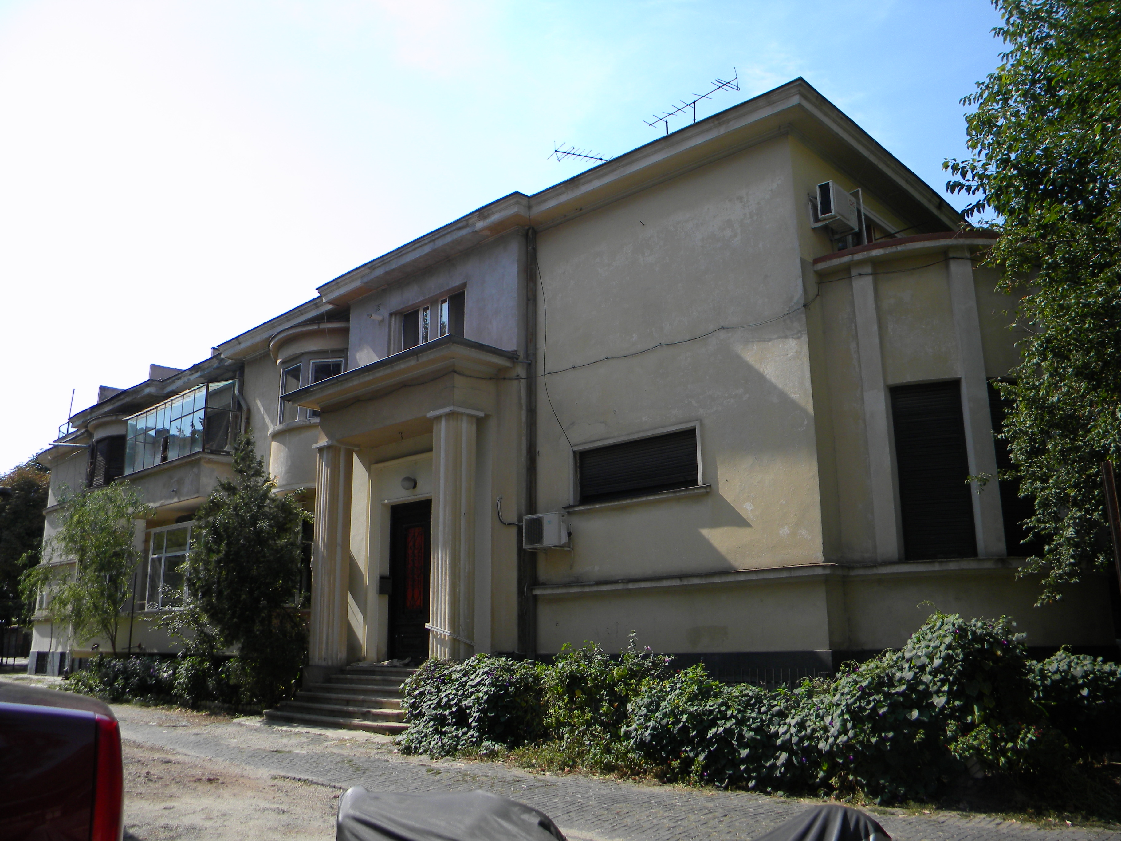 Bucuresti, Romania, Casa ing. Anghel Saligny pe Str. Occidentului nr. 8-10, sect. 1 (detaliu 2, nr. 10)